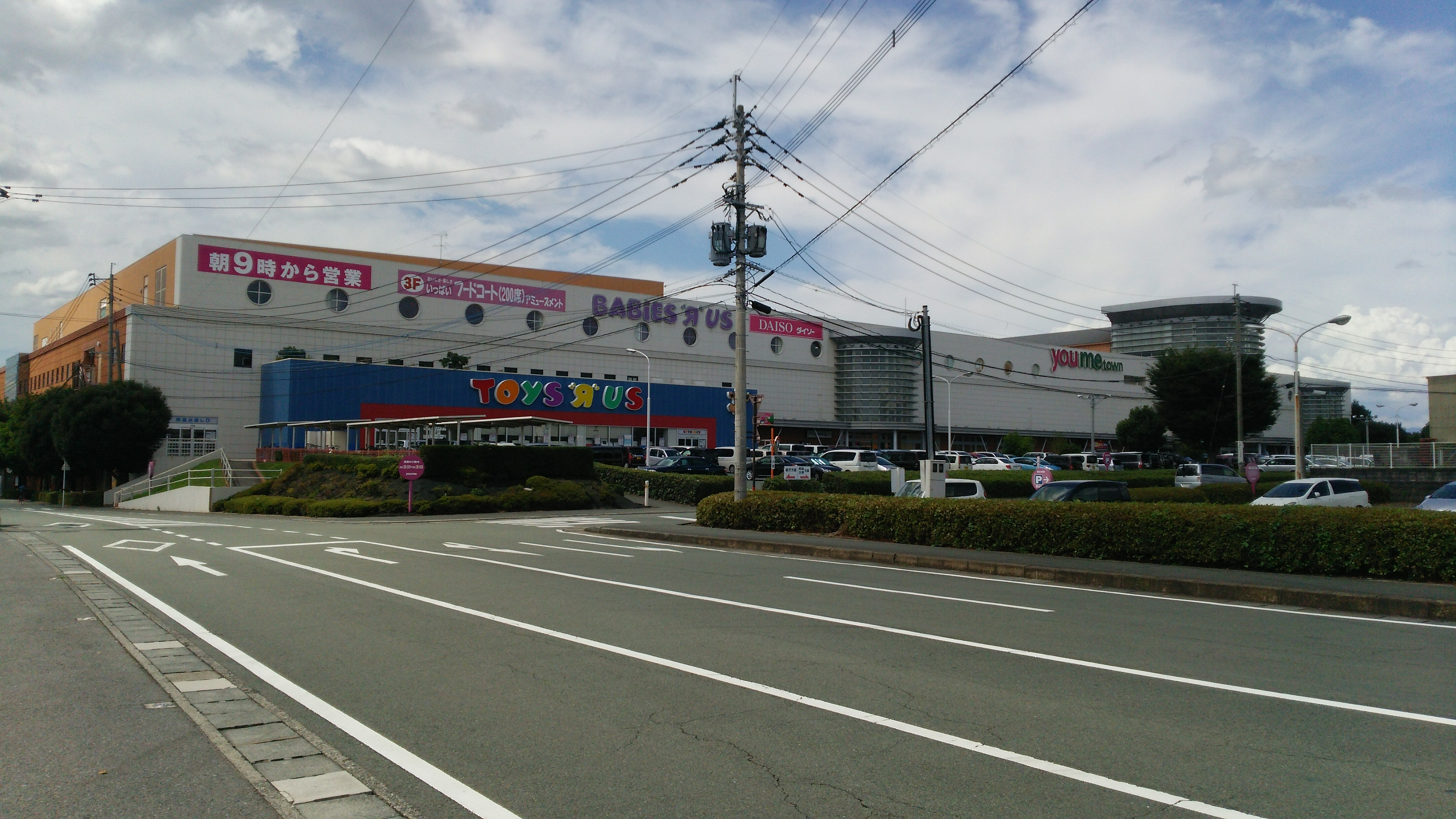 ゆめタウンサンピアン（外観）